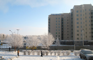 новый (третий) микрорайон в наукограде Кольцово Категория:Изображения:Типовые серии жилых домов